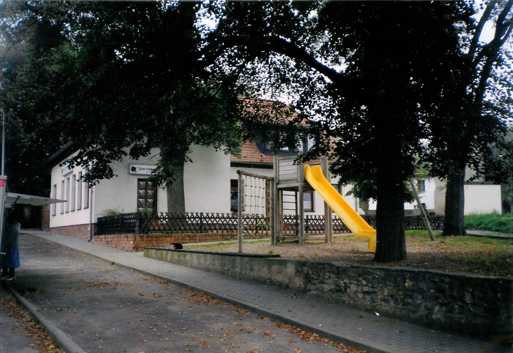 Blick auf das ehemalige Schulgebäude in Groß Schierstedt, später Gaststätte und heute Altenpflegeheim "Unter den Linden"